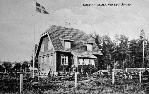 Soltorps skola var den första skolan i Storängen. Den startades omkring 1905 av fru Åstrand. Skolan låg på Duvnäsvägen 12, nuvarande John Lodéns väg 14. Huset ritades 1904 av Kristian Lundmark.